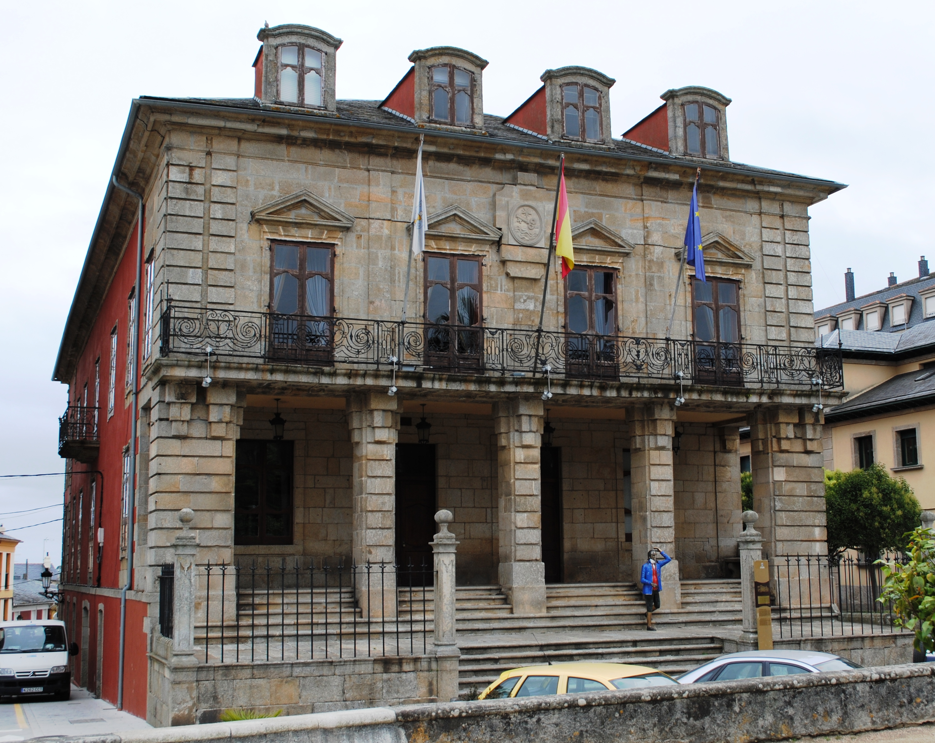 Véxase o título e as categorías